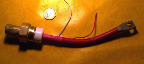 SCR de potencia